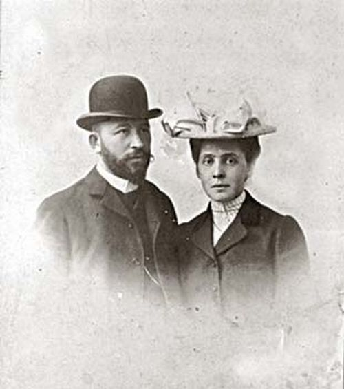 Самарины Александр Дмитриевич и Вера Саввишна